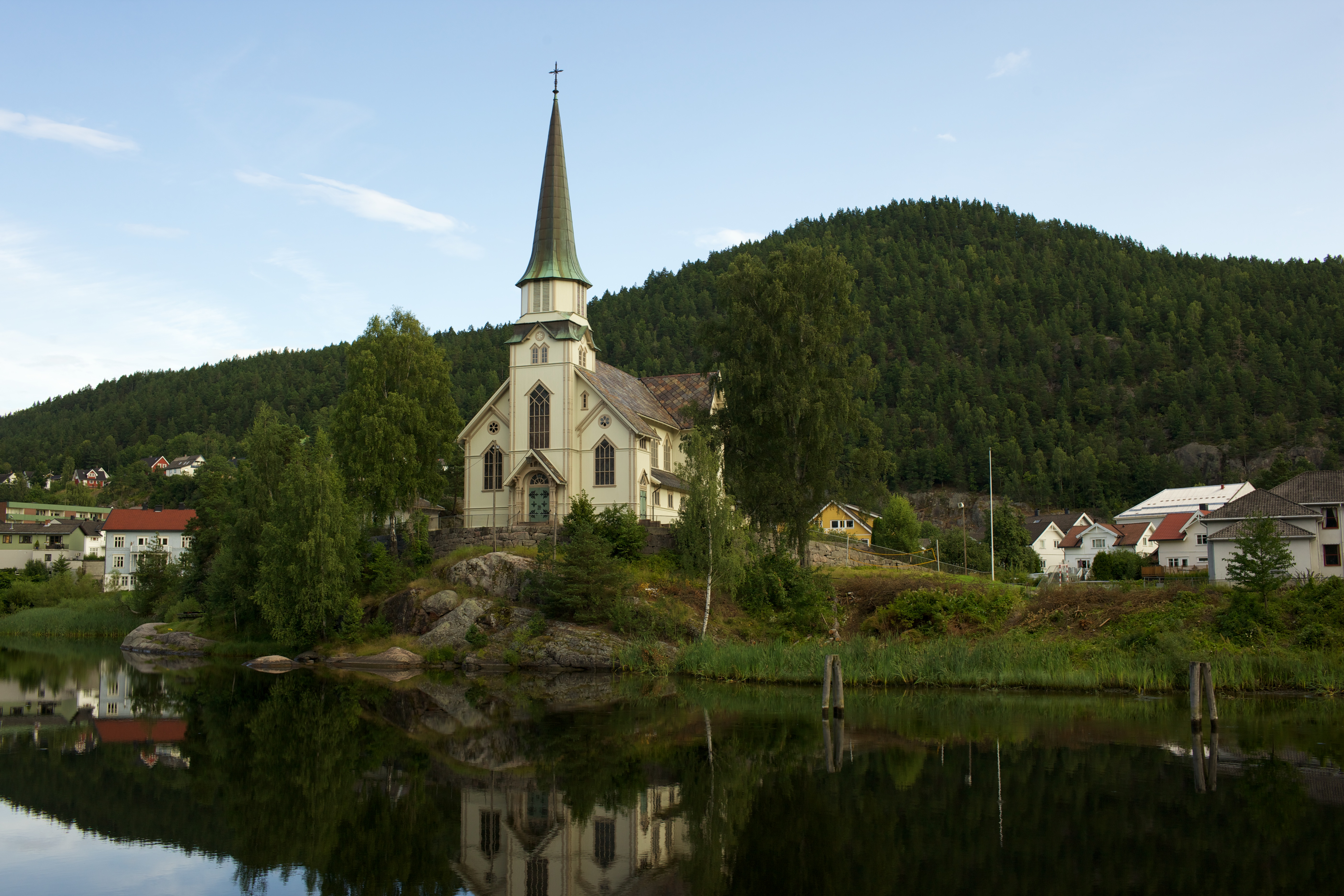 Utsikt fra Victoria